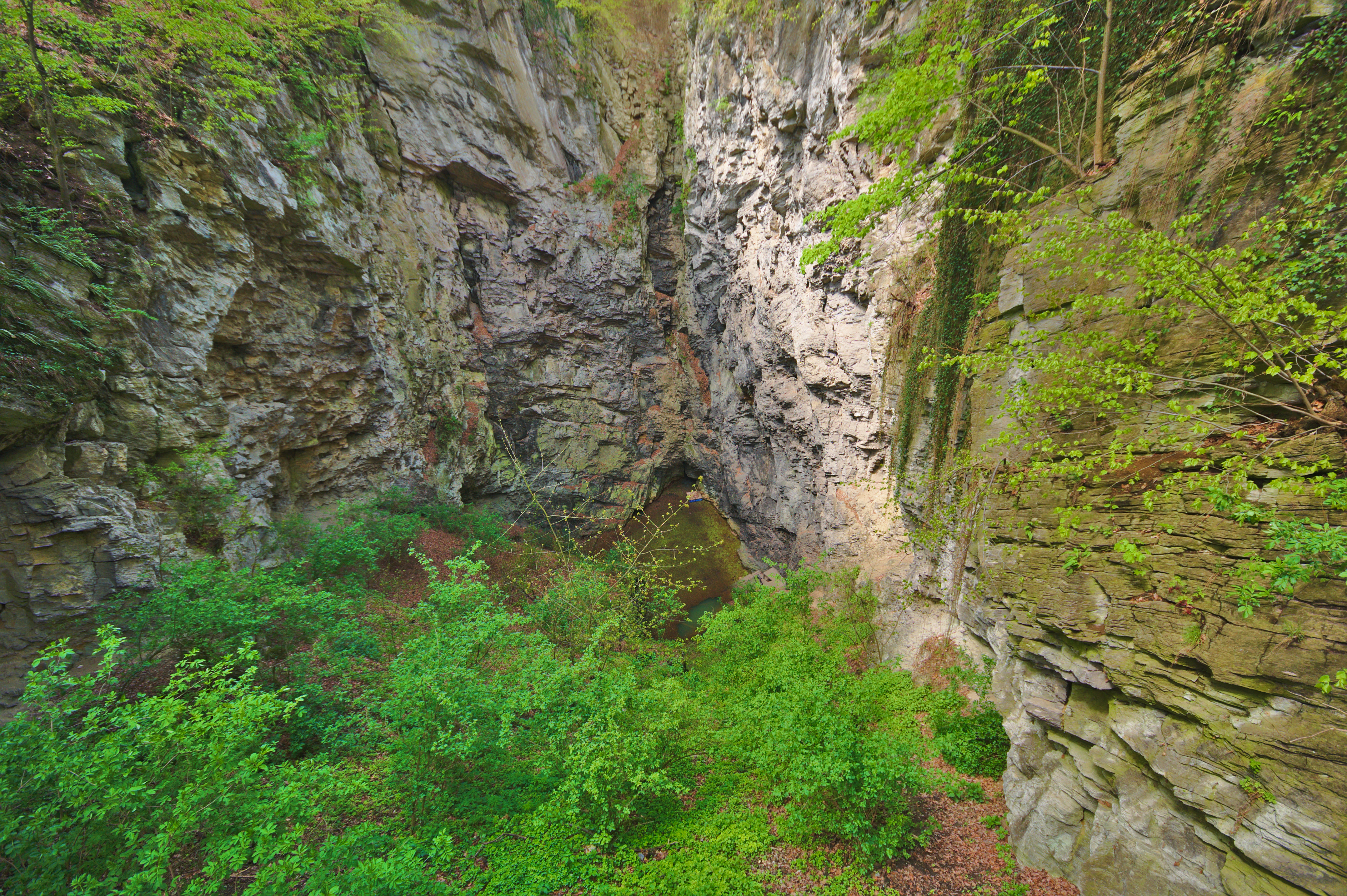 Hranická propast, národní přírodní rezervace Hůrka u Hranic, okres Přerov